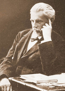 Сумцов, Николай Федорович